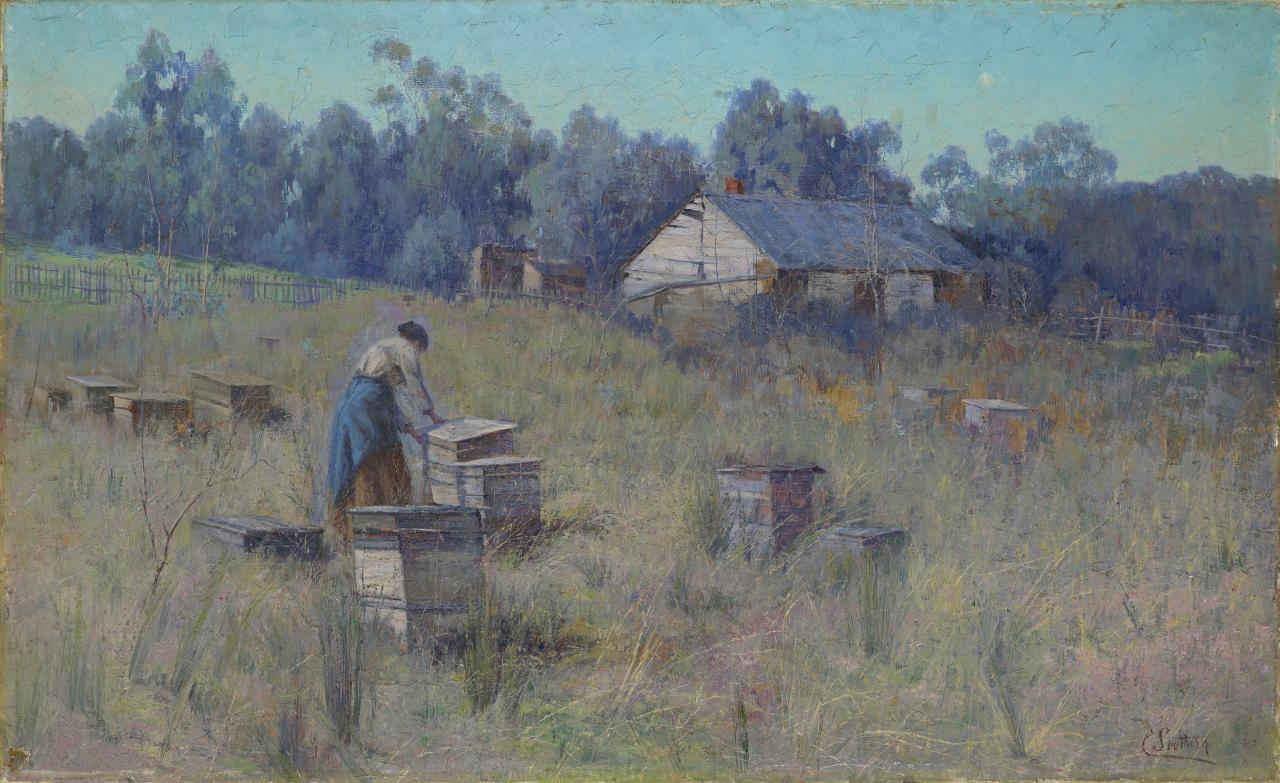 Medium oil on canvas, 69 x 112cm